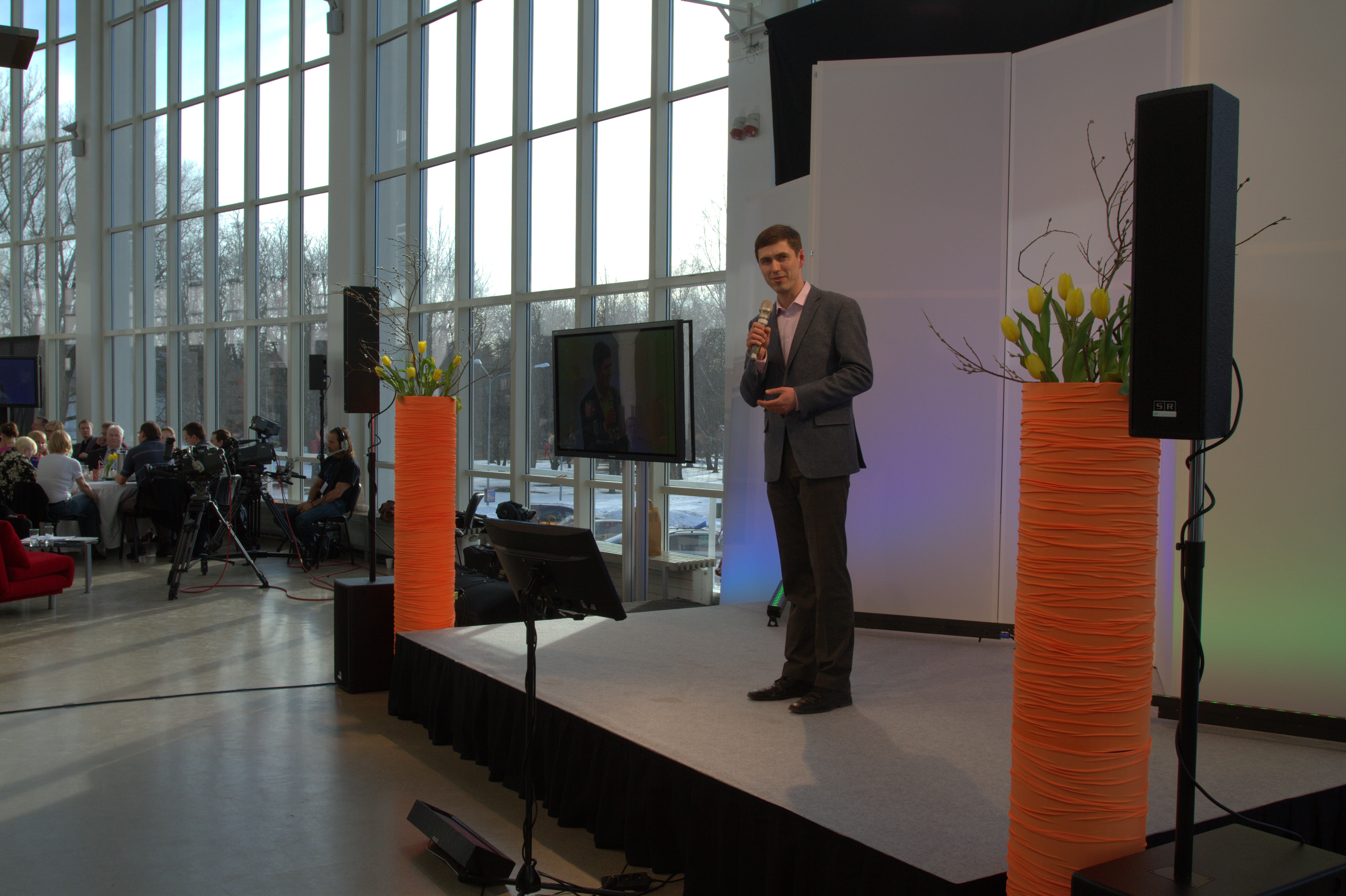 Rahvakogu arutelupäev 6. aprillil 2013 Tallinna lauluväljakul. Urmo Kübar.